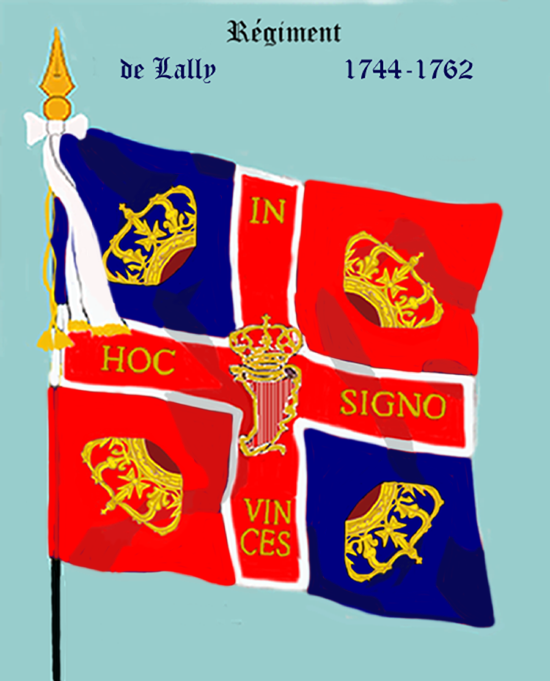 Ordonnanzfahne eines Fremdenregiments im königlich französischen Dienst. - Entnommen und überarbeitet aus: „LES UNIFORMES ET LES DRAPEAUX DE L'ARMÉE DU ROI“ Marseille 1899. (Drapeau d'Ordonnance d' un régiment etranger au service française.)